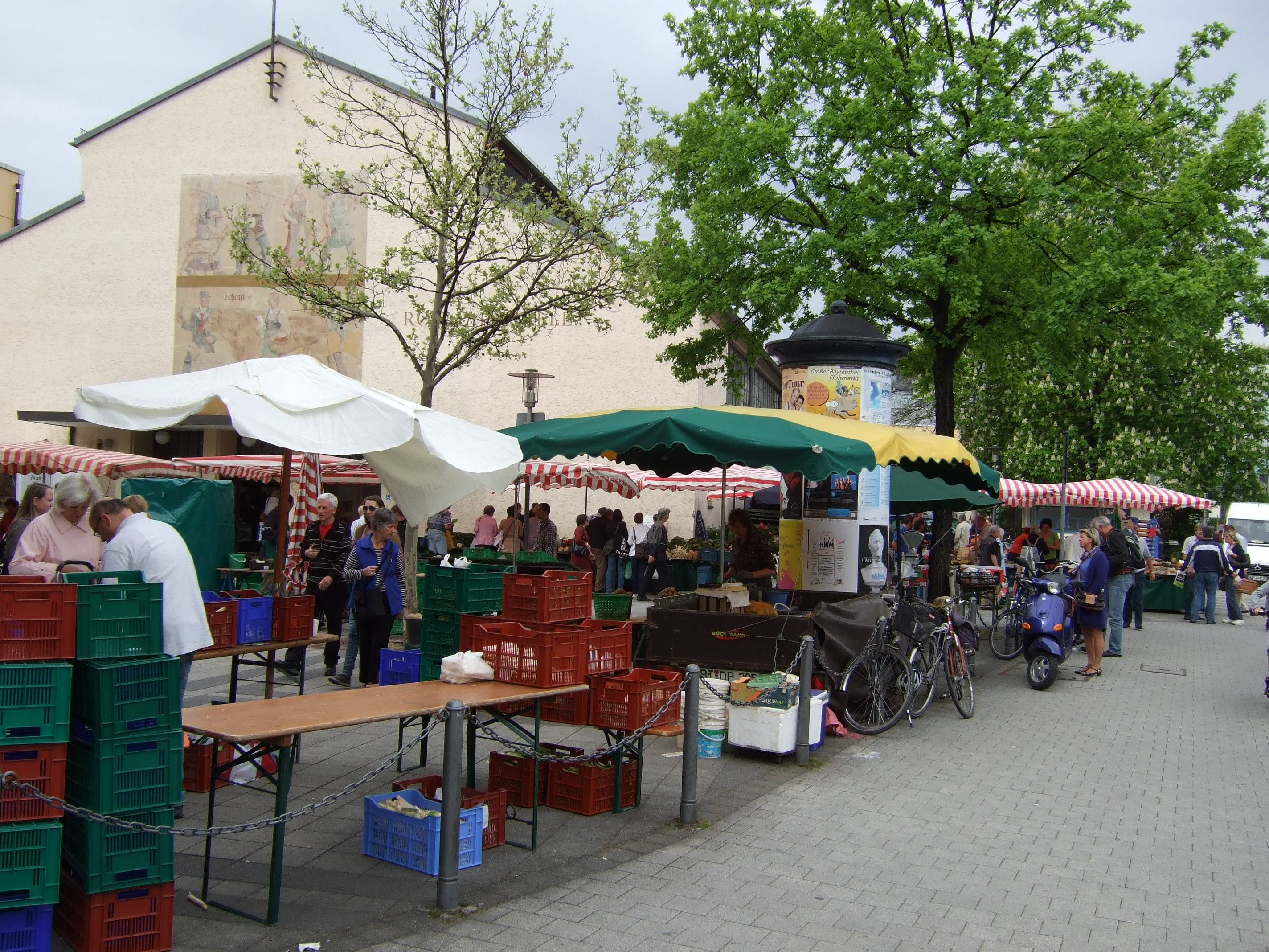 Bayreuth Rotmainhalle This is a photograph of an architectural monument.